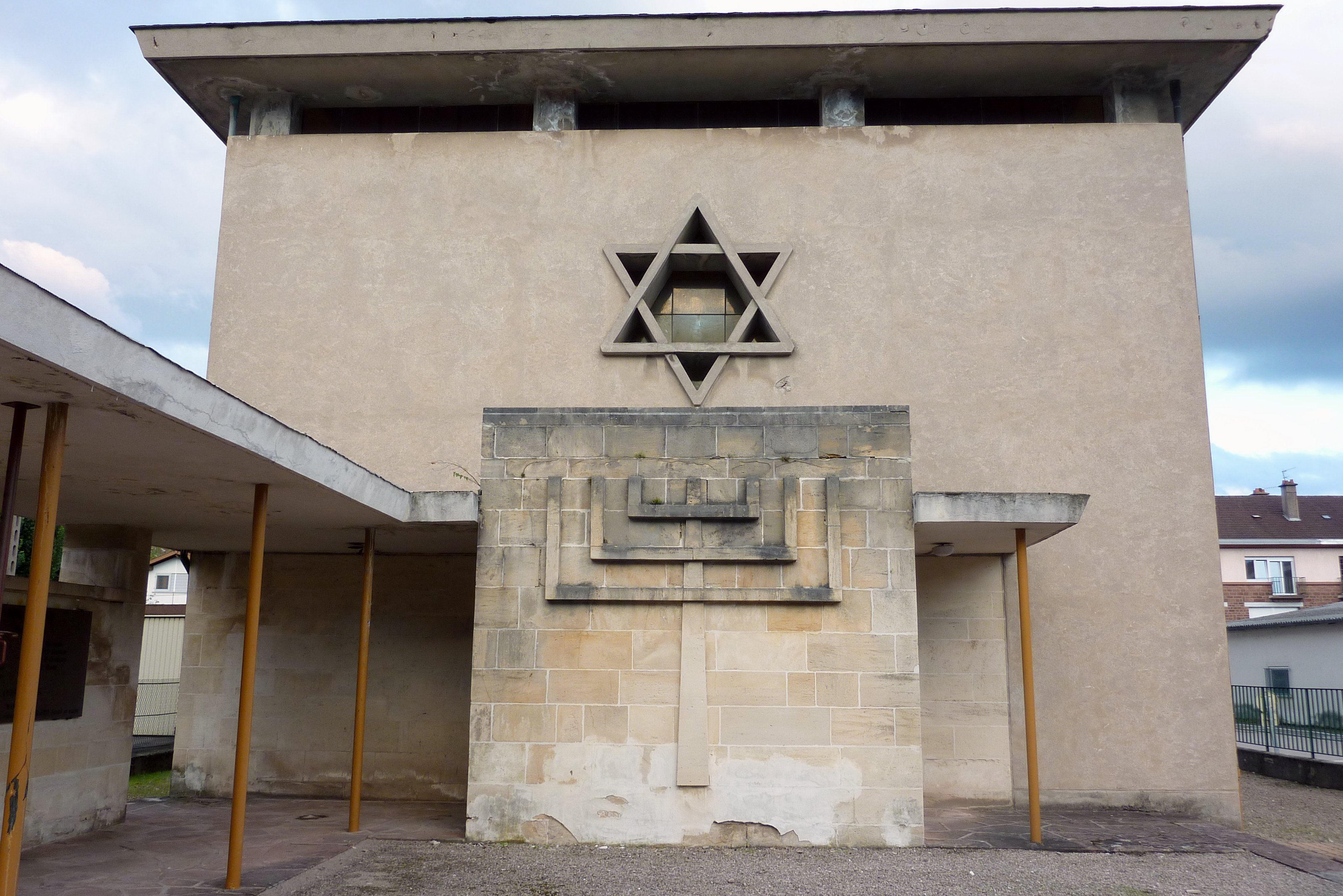 Synagoge in Saint-Dié-des-Vosges im Département Vosges (Lothringen/Frankreich)